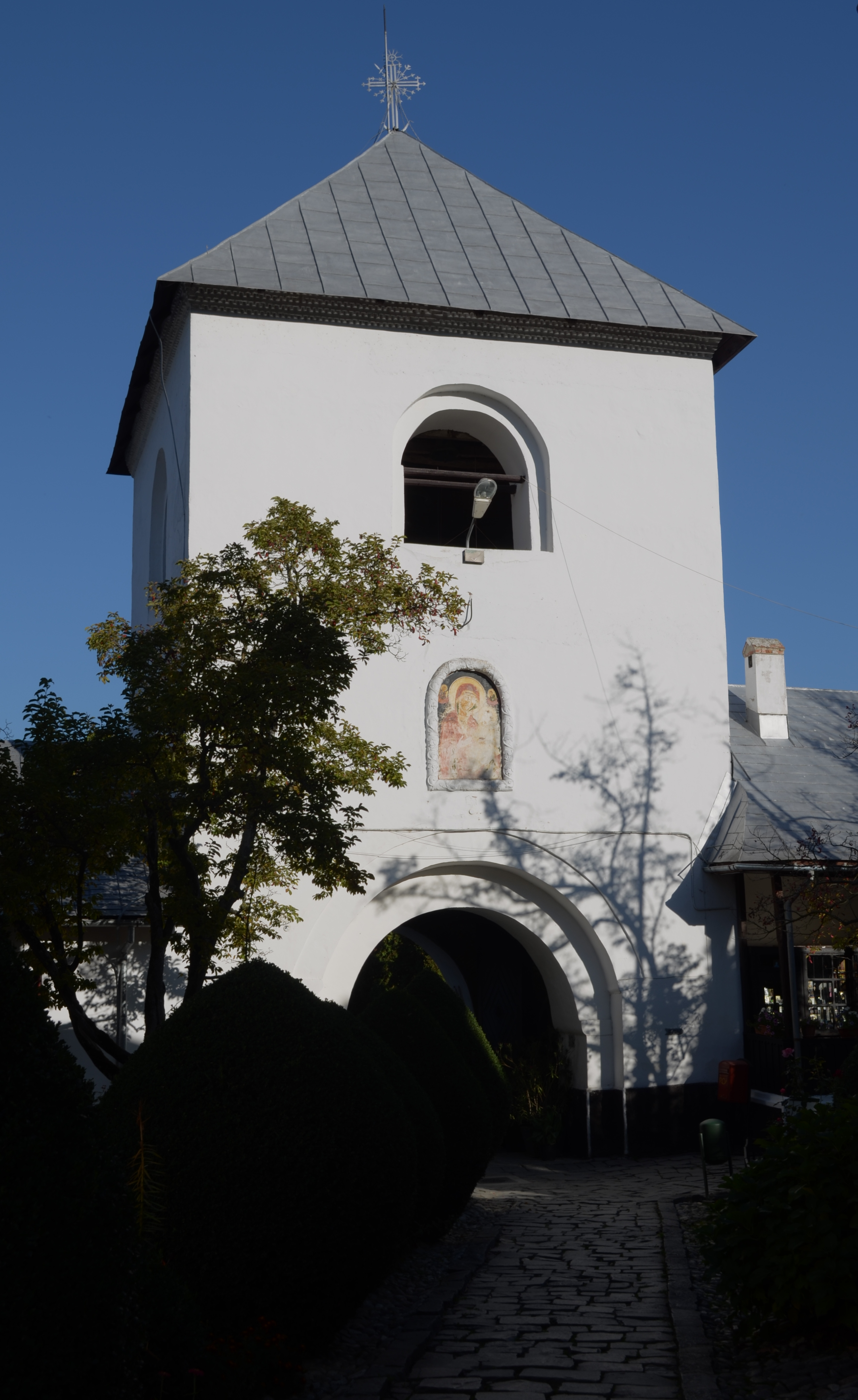 Turnul Clopotniță, Mănăstirea Dintr-un Lemn, județul Vâlcea 04